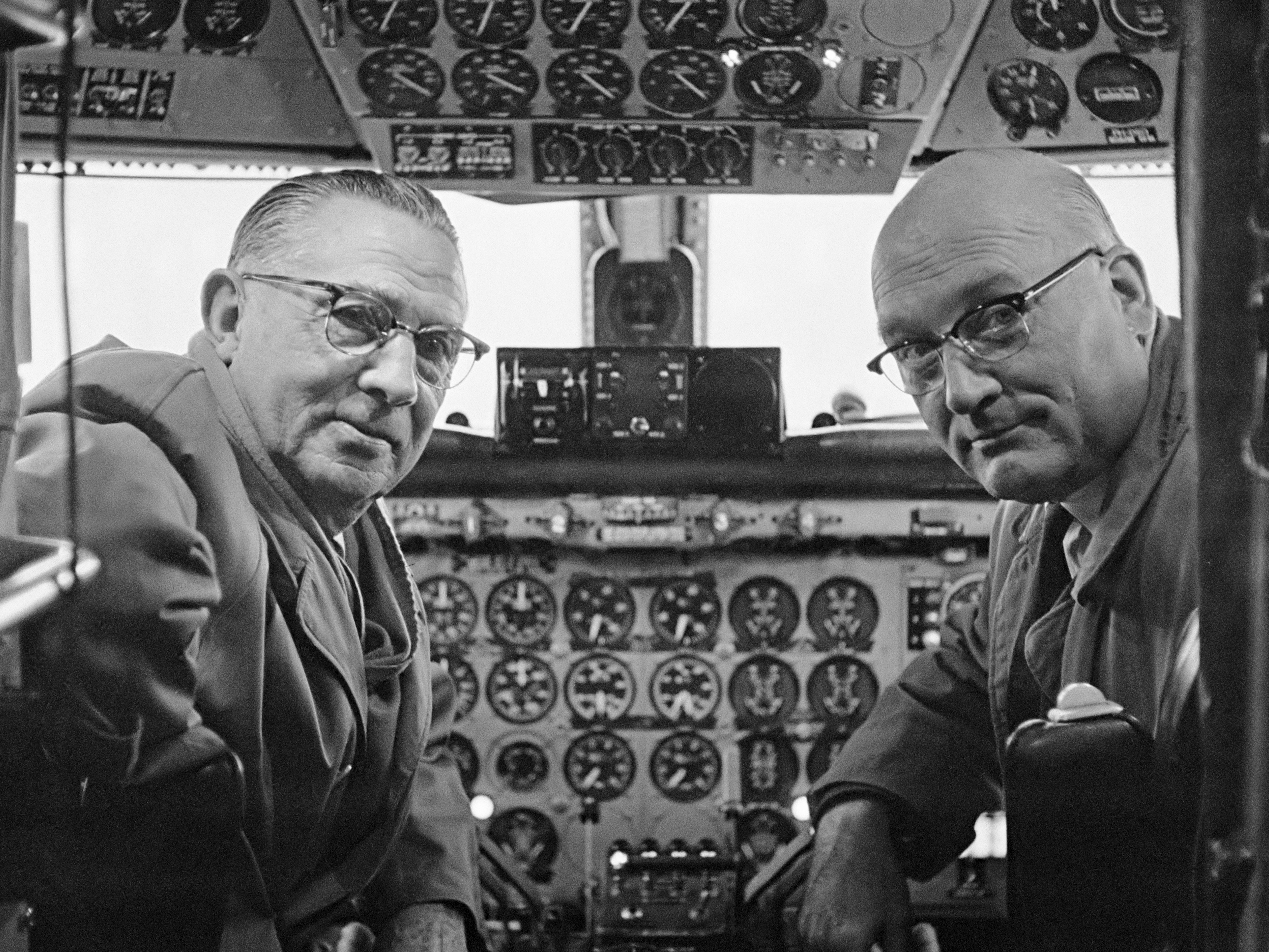 Persconferentie, t.g.v. het 25-jarig bestaan van de Westindieroute van KLM; links de vroegere gezagvoerder Hondong en rechts Van Balkom 16 december 1959